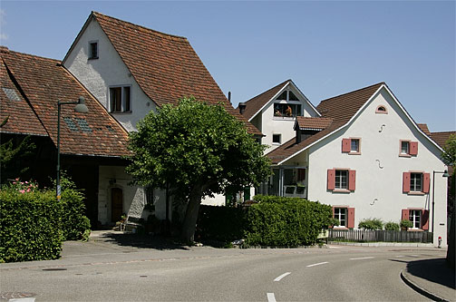 Alter Dorfteil von Oberwil